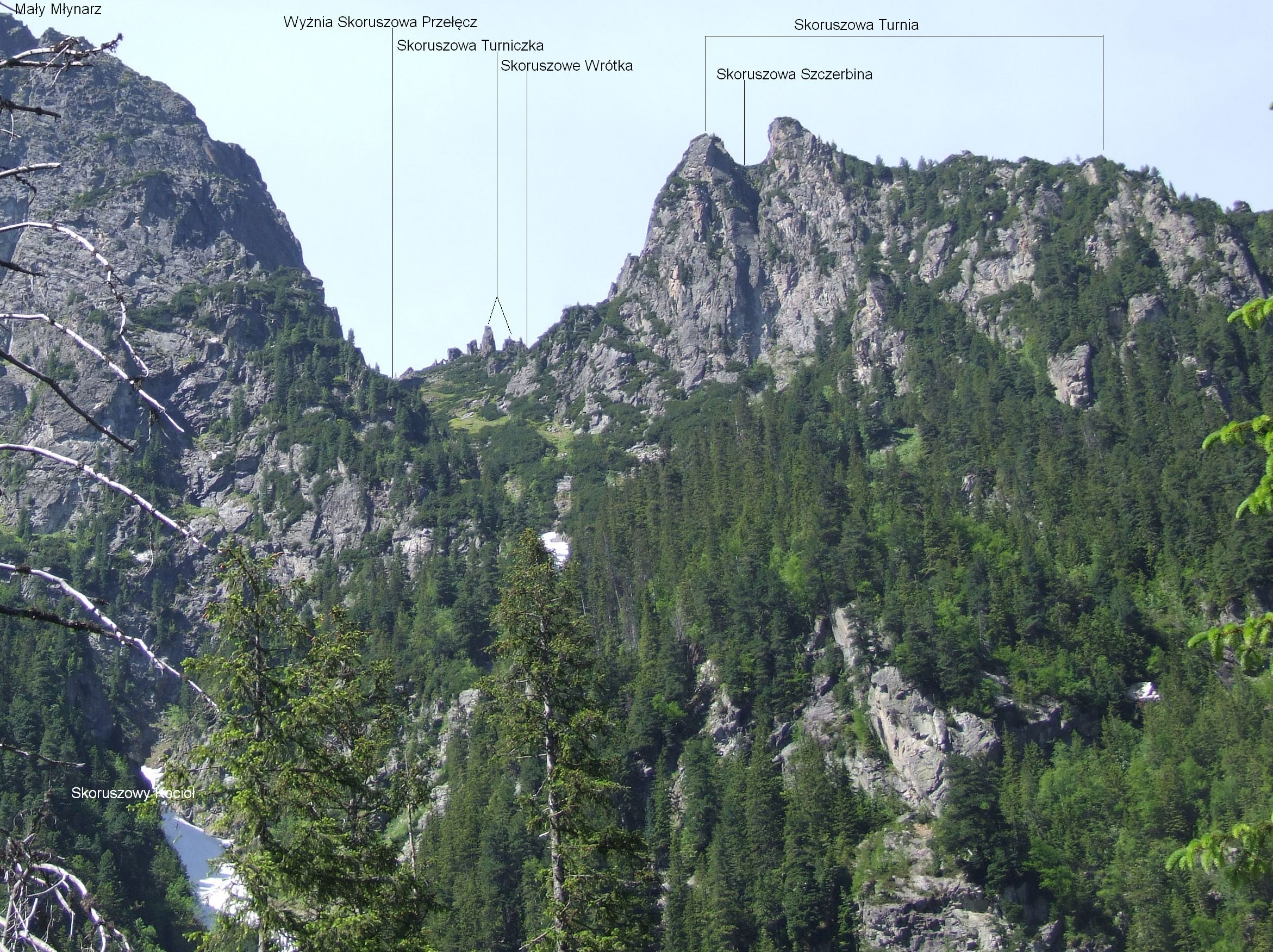 Wyżnia Skoruszowa Przełęcz